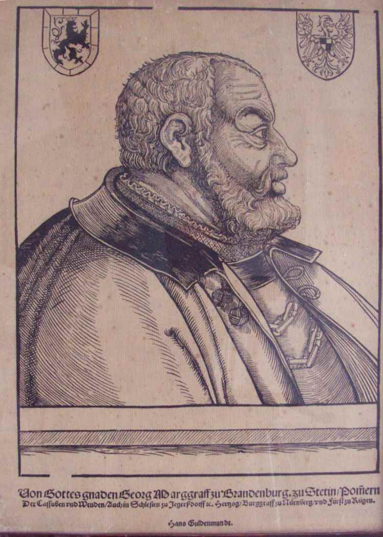 George der Fromme, markgraf zu Brandenburg-Ansbach und Herzog von Jägerdorf